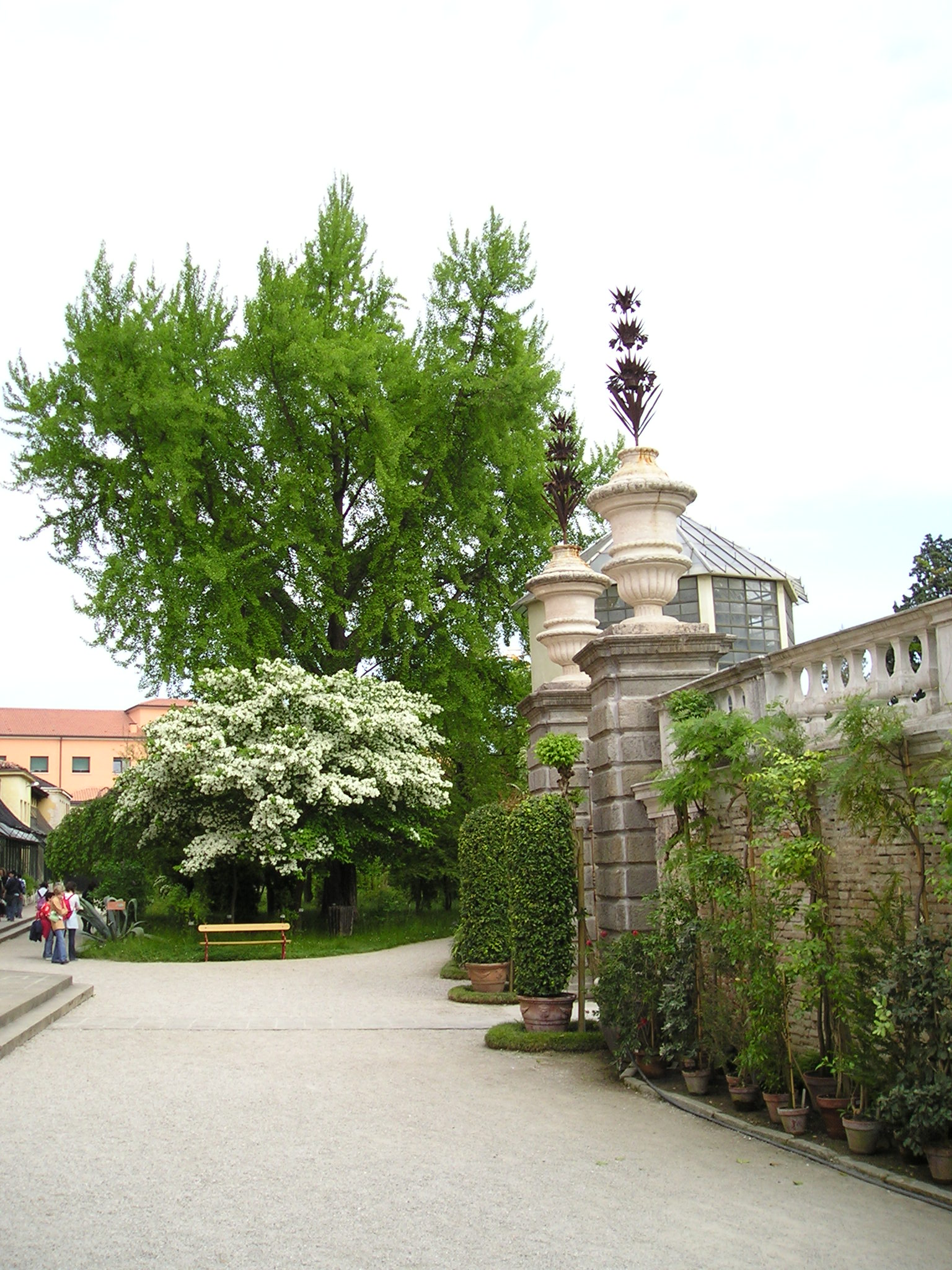 Puutarhan pohjoinen portti.